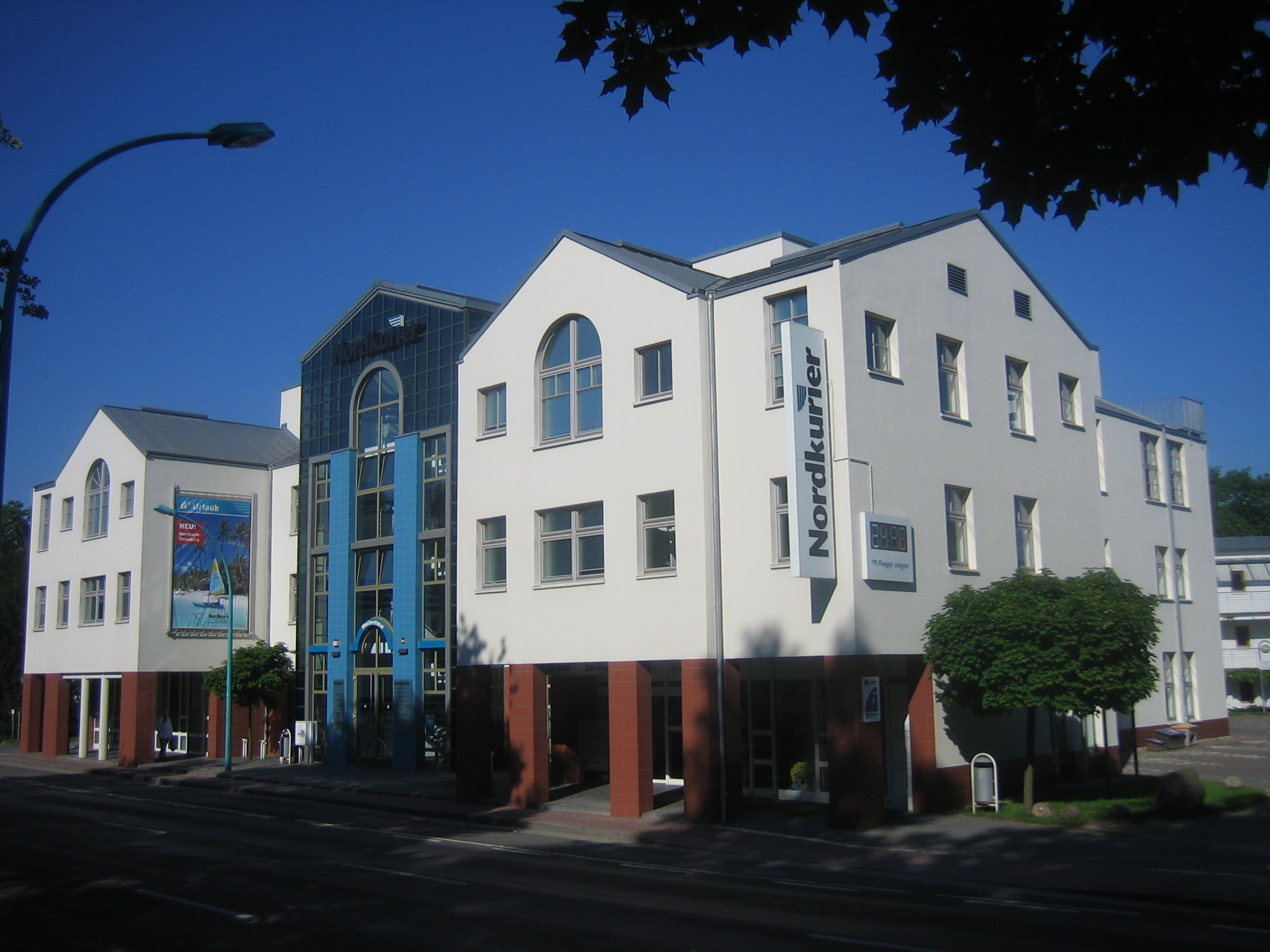 Nordkurier-Verlagsgebäude, Friedrich-Engels-Ring 29, Neubrandenburg, Mecklenburg-Vorpommern